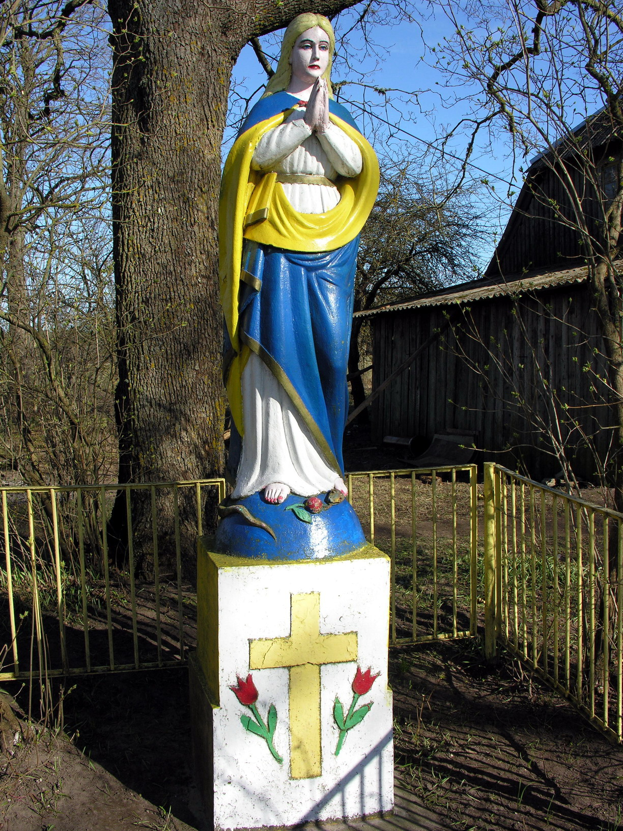 Šv. Marija pamynusi žaltį 2007 m. balandžio 13 d., Lietuva